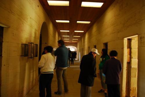 中文（中国大陆）: 塔斯马尼亚亚瑟港单间牢房